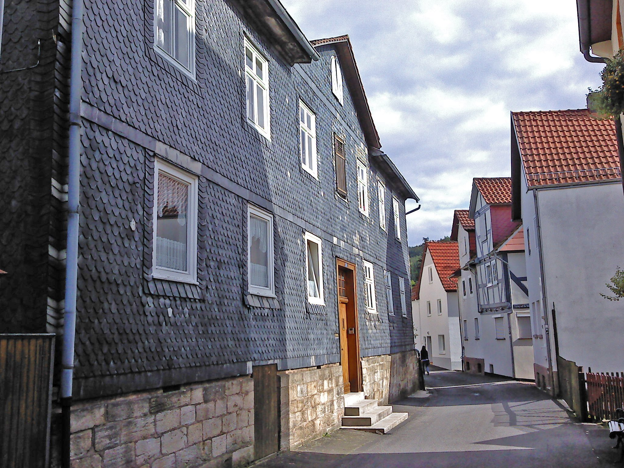 Die Spangenberger Synagoge in der Untergasse. Heute ein Wohnhaus